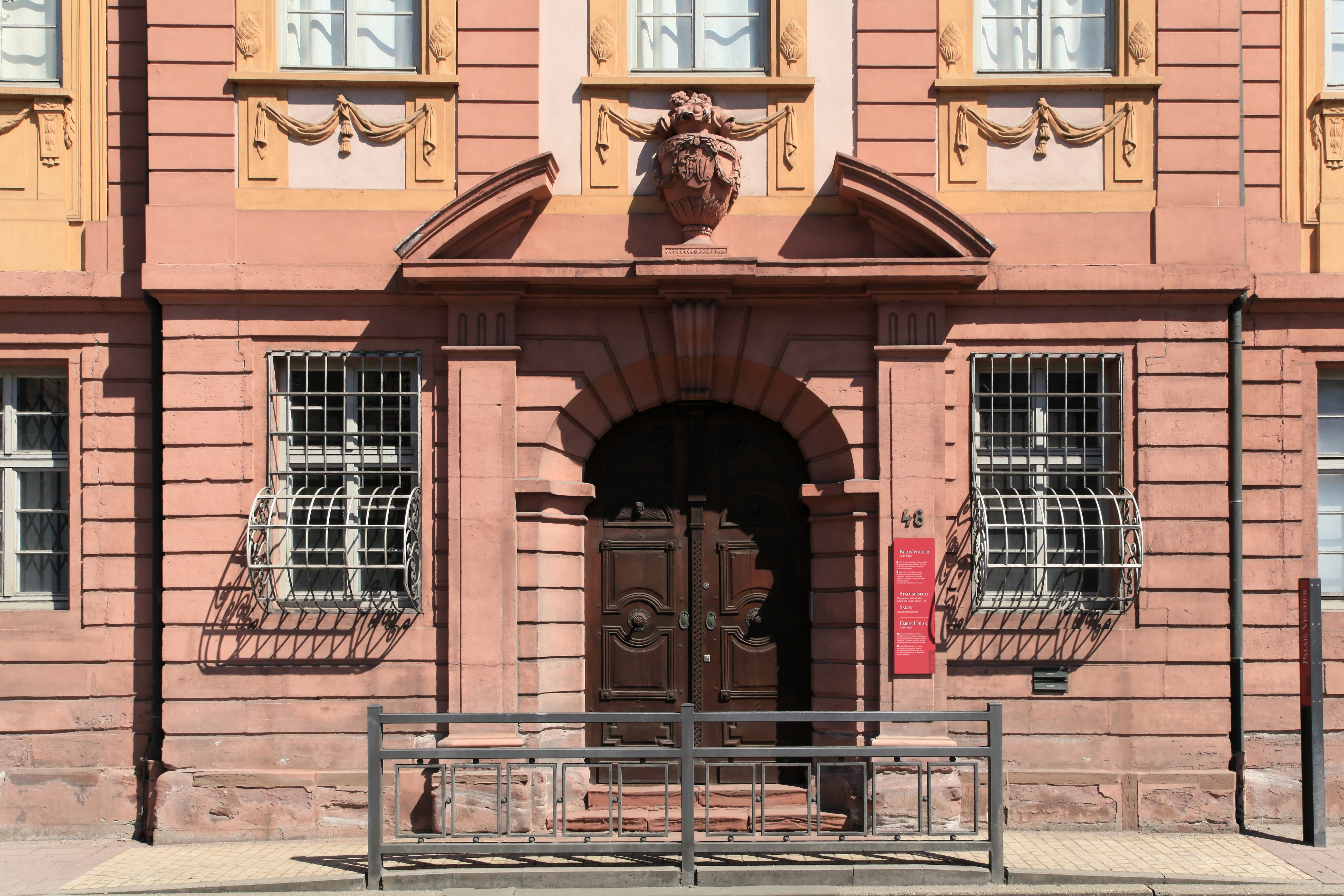 Palais Vischer, Bischofstraße 48 in Calw